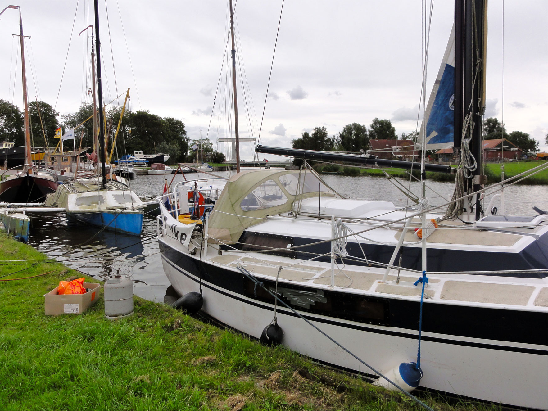 Dokkumer Grootdiep bij de Stienfeksterbrêg